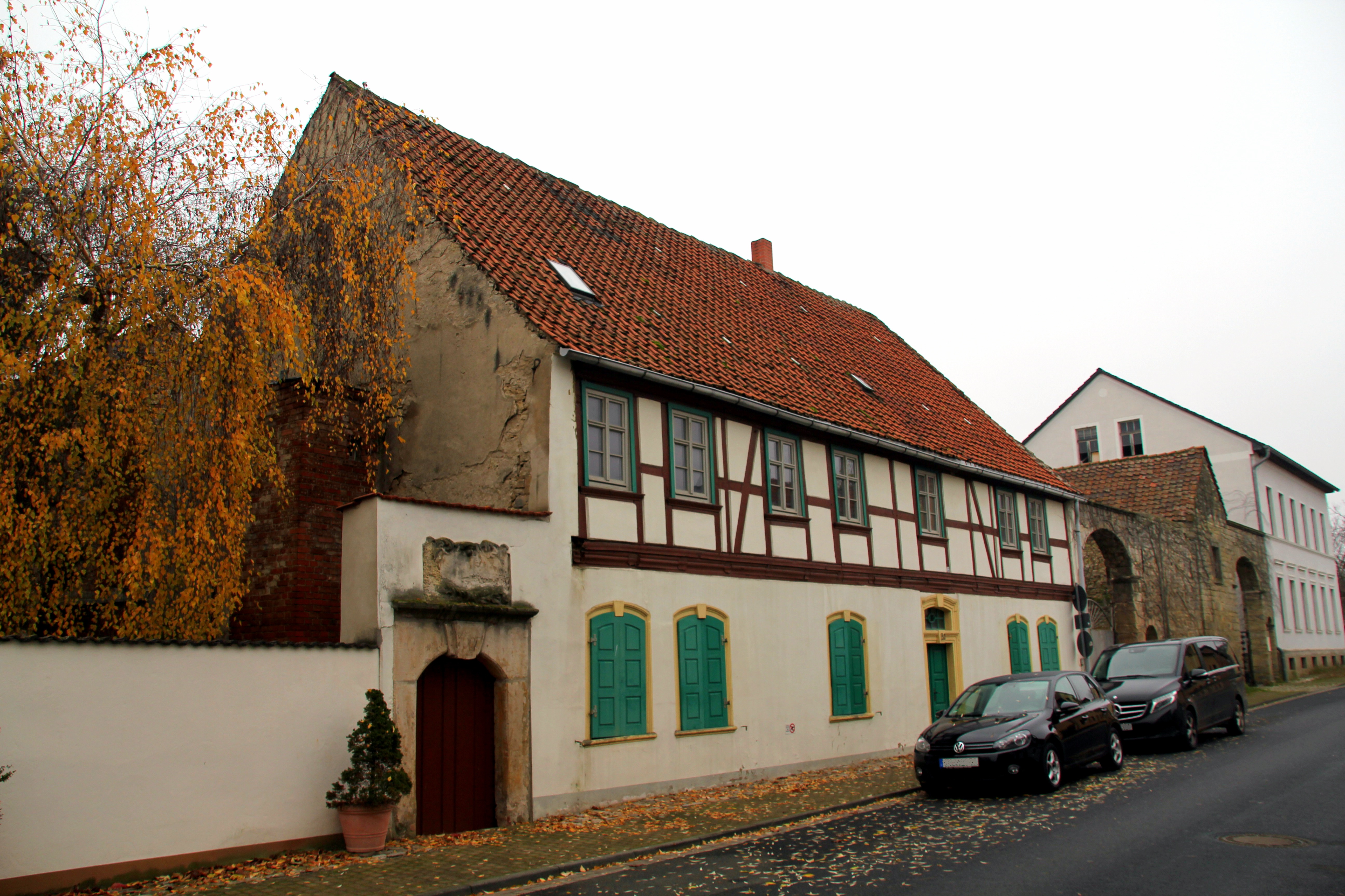 Bauernhof Dr.-Hübener-Straße 31 Bottmersdorf